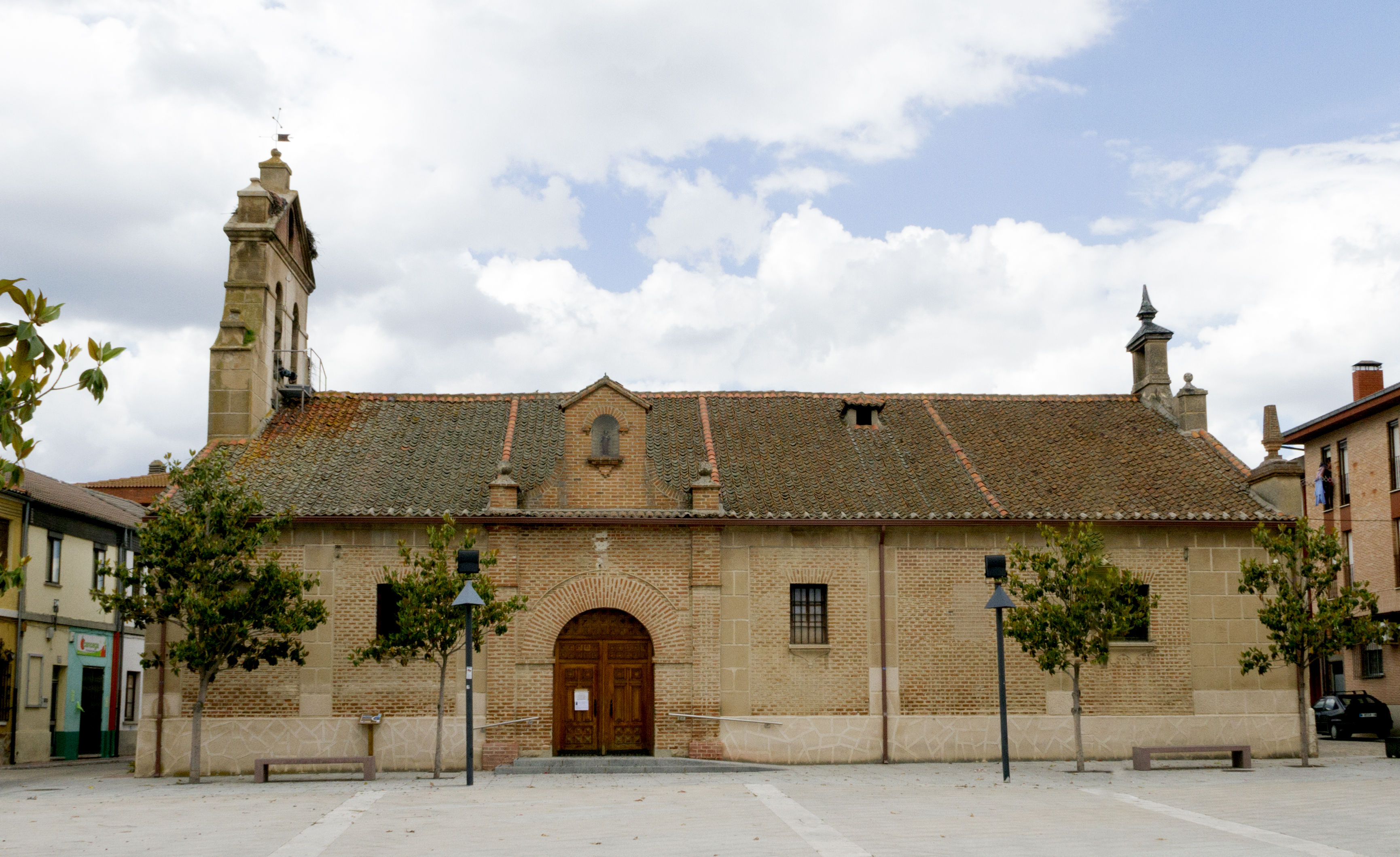 Parroquia de Santiago Apóstol frontal de Navas de Oro Plano general